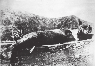 Orion harrapatutako azken balea (1901)